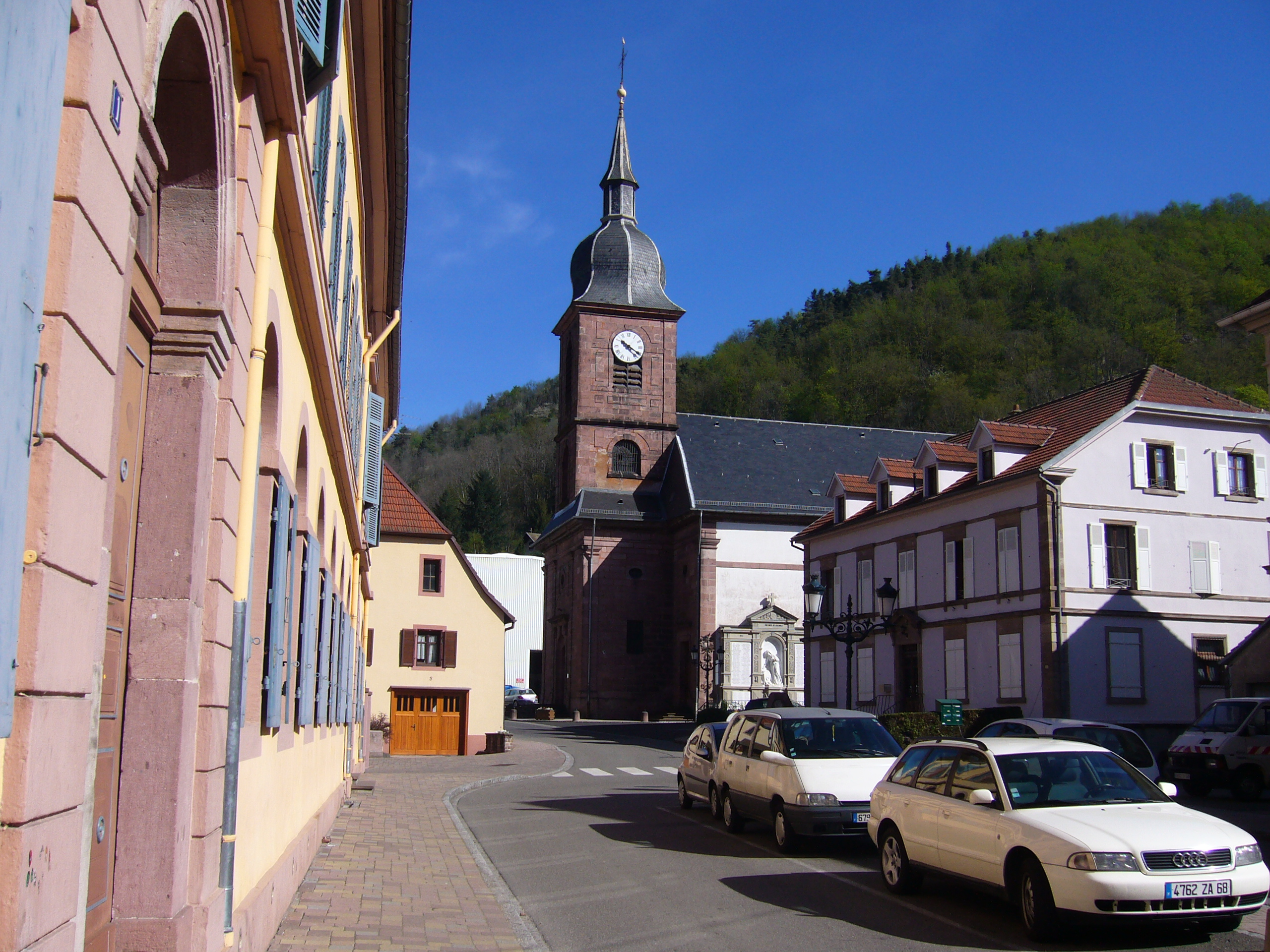 Sainte Croix-aux-Mines 374.JPG